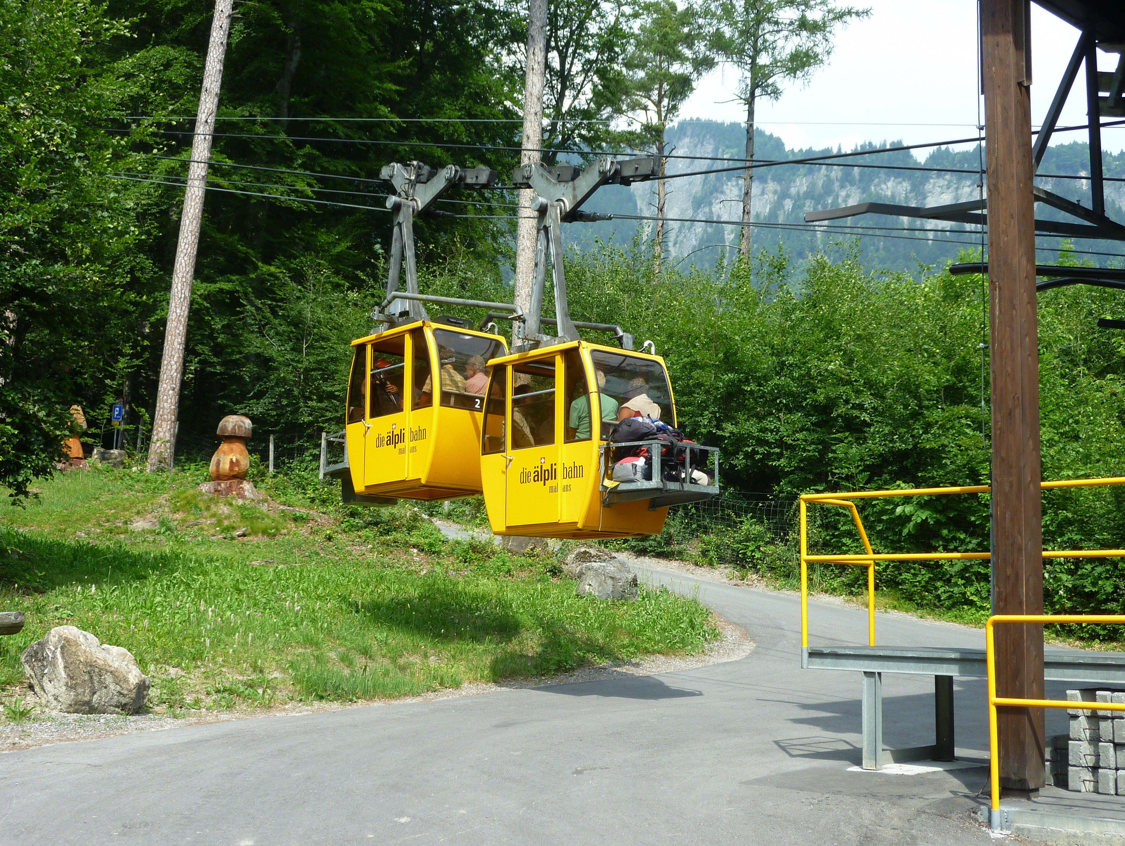 Älplibahn in Malans, ehemalige Militärseihlbahn: SB0105 SP/Pr Malans-Oberälpli (1 Sektion)